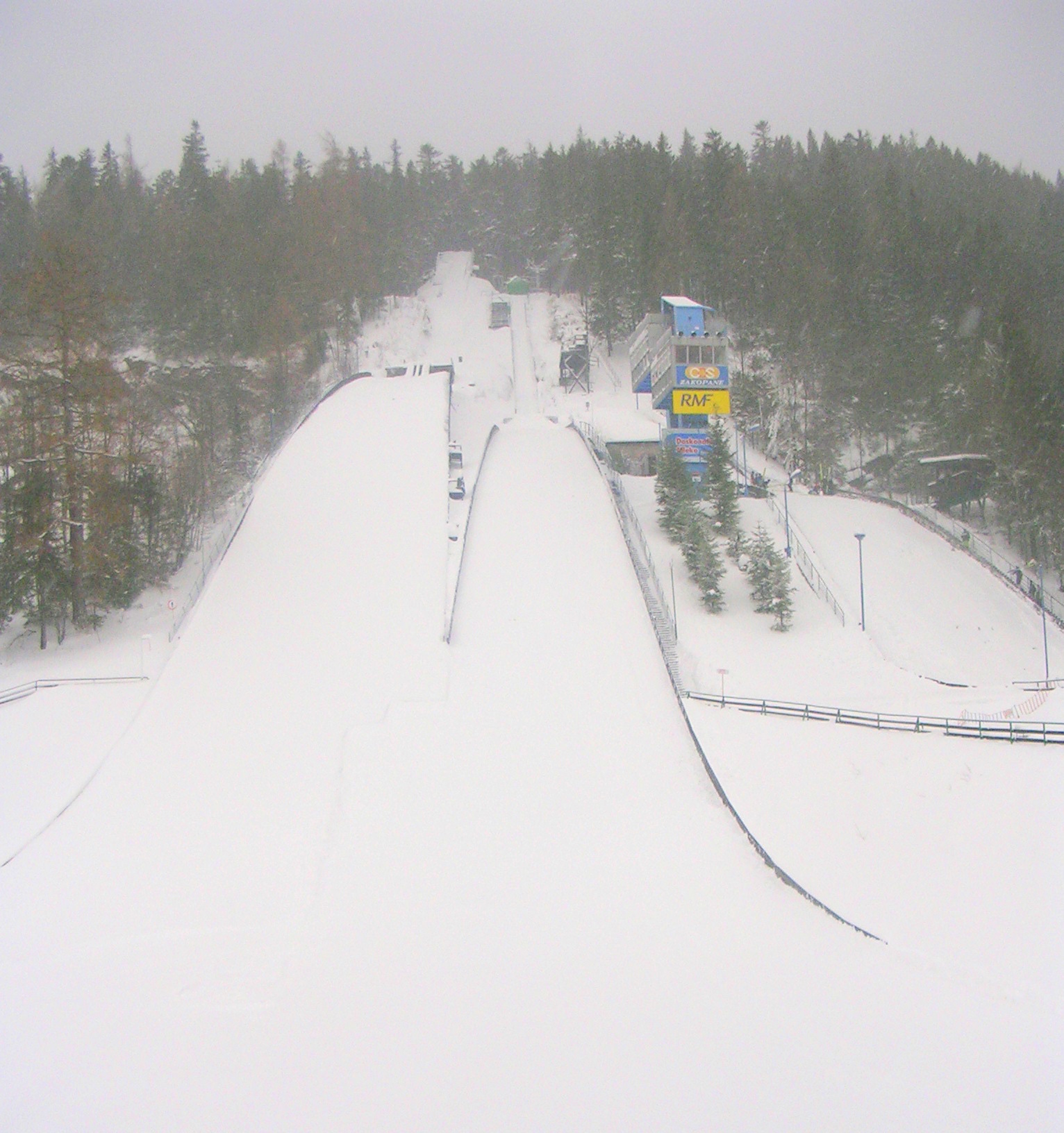 Srednia Krokiew ski jumping hill in Zakopane, Poland